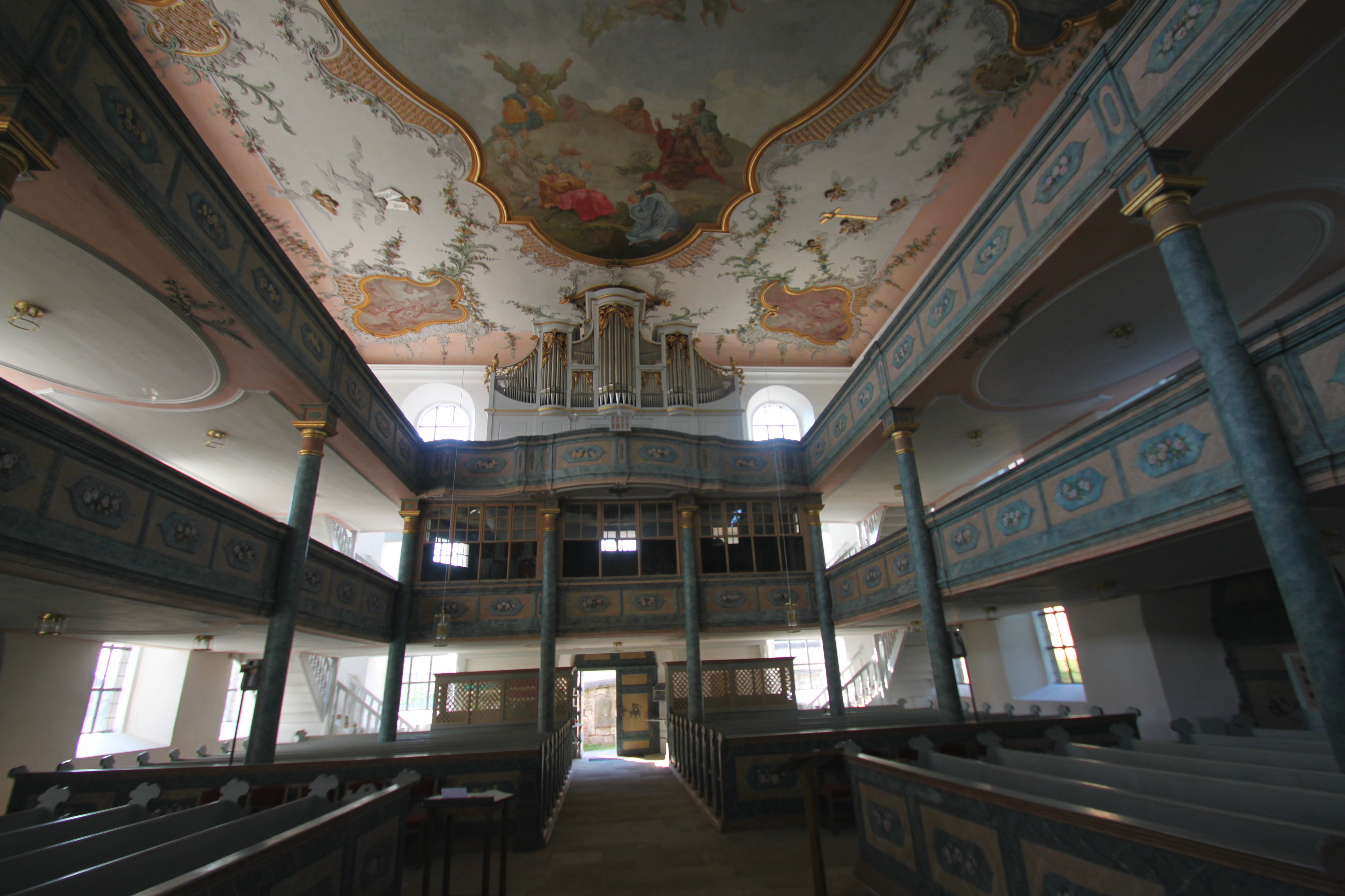 Evangelisch-lutherische Dreifaltigkeitskirche NeudrossenfeldThis is a photograph of an architectural monument.